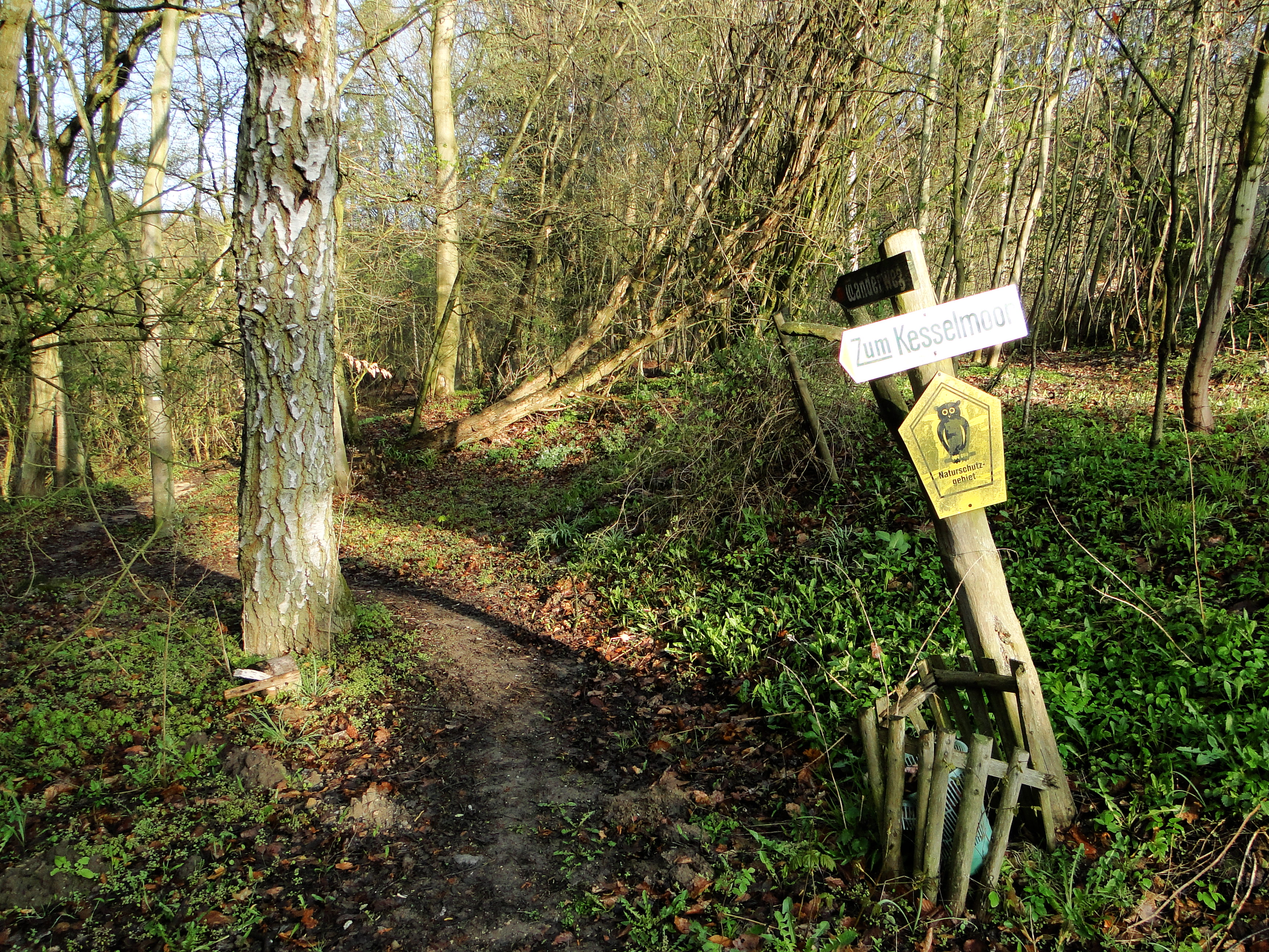 Naturschutzgebiet Teterower Heidberge